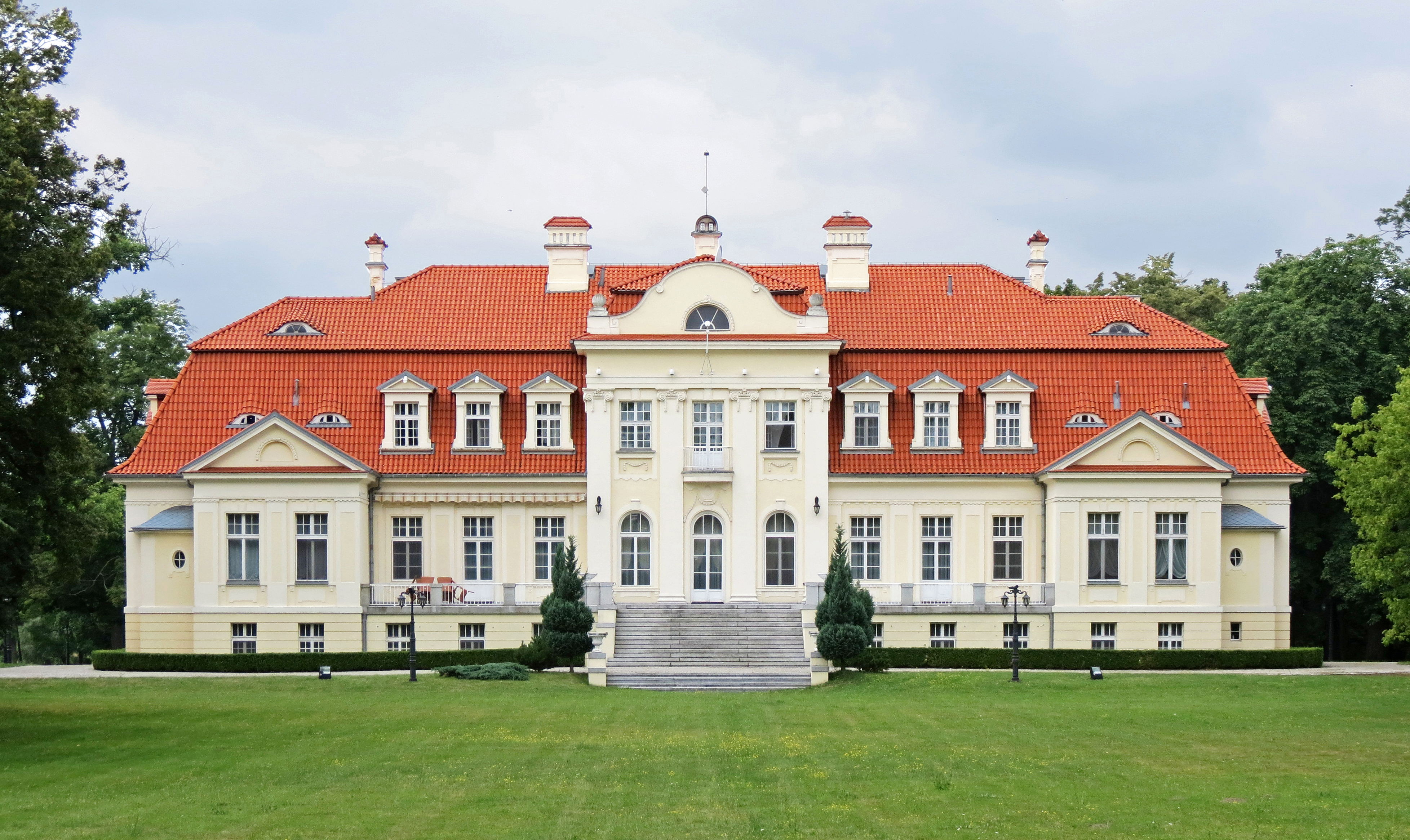 Winna Góra, dwór, 1807-1818, 1910